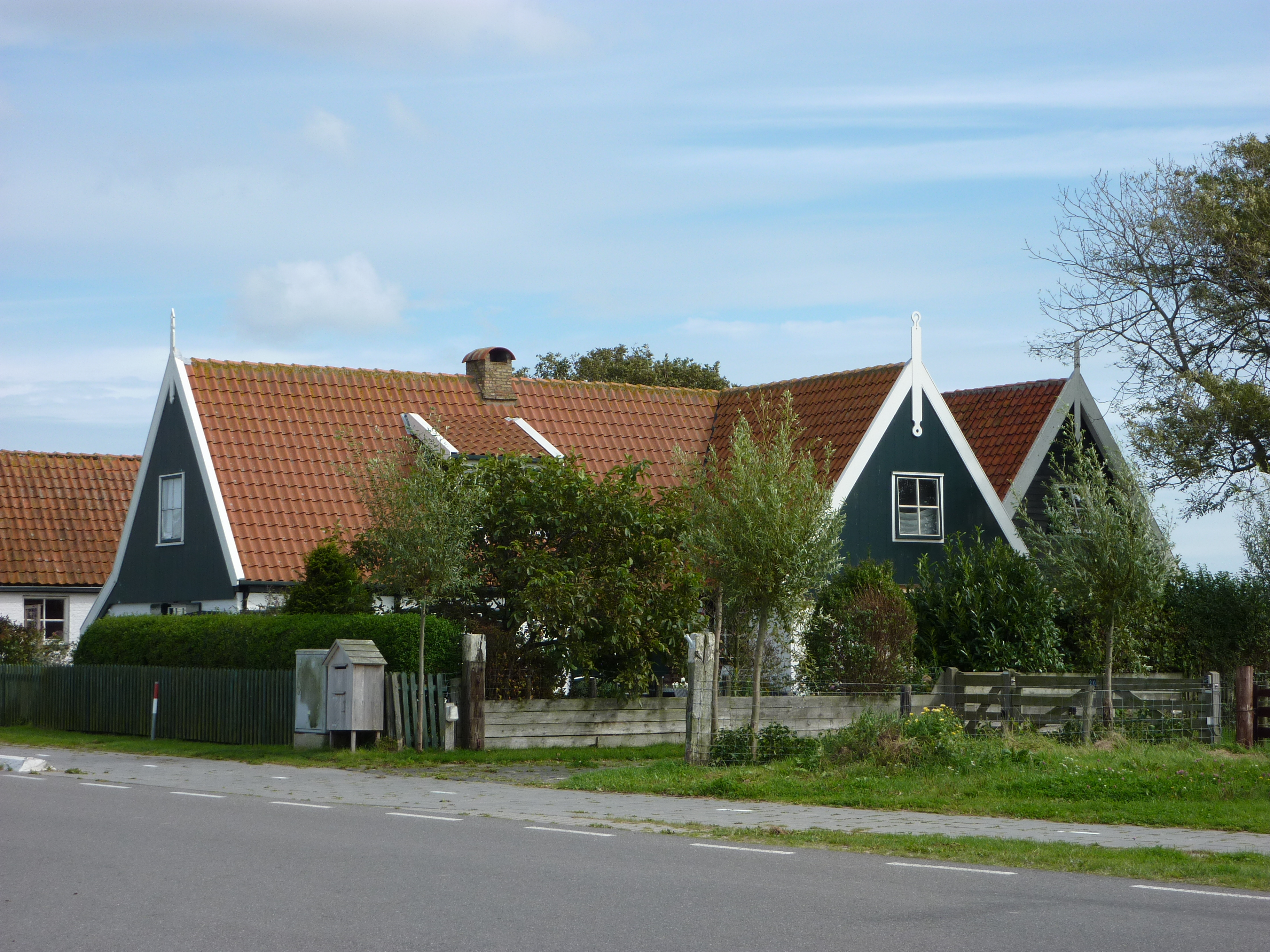 Woonhuis - Oosterweg 22, Oosterend, Texel